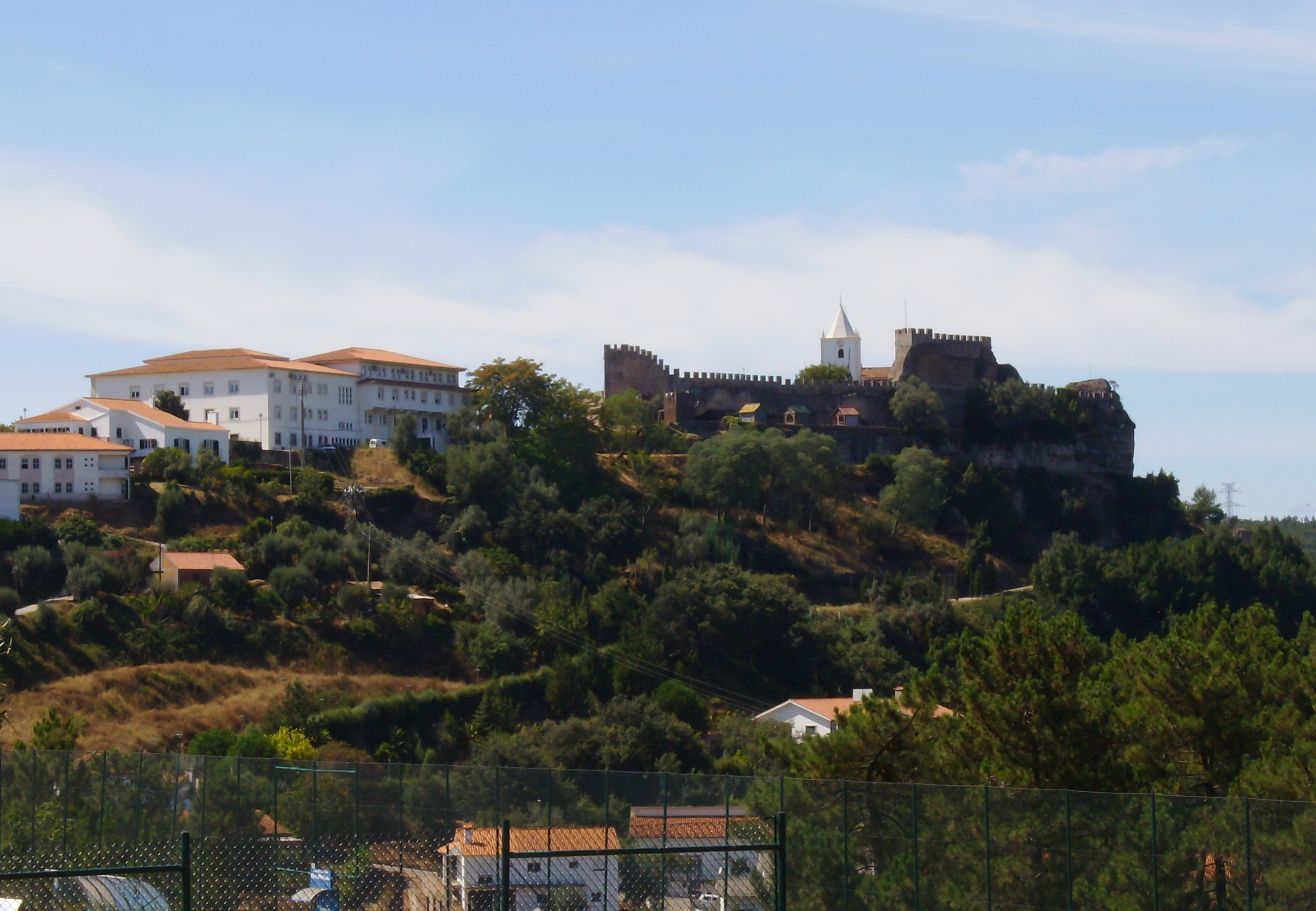 Castelo de Penela, freguesia de Santa Eufémia, concelho de Penela, distrito de Coimbra, Portugal: vista panorâmica.